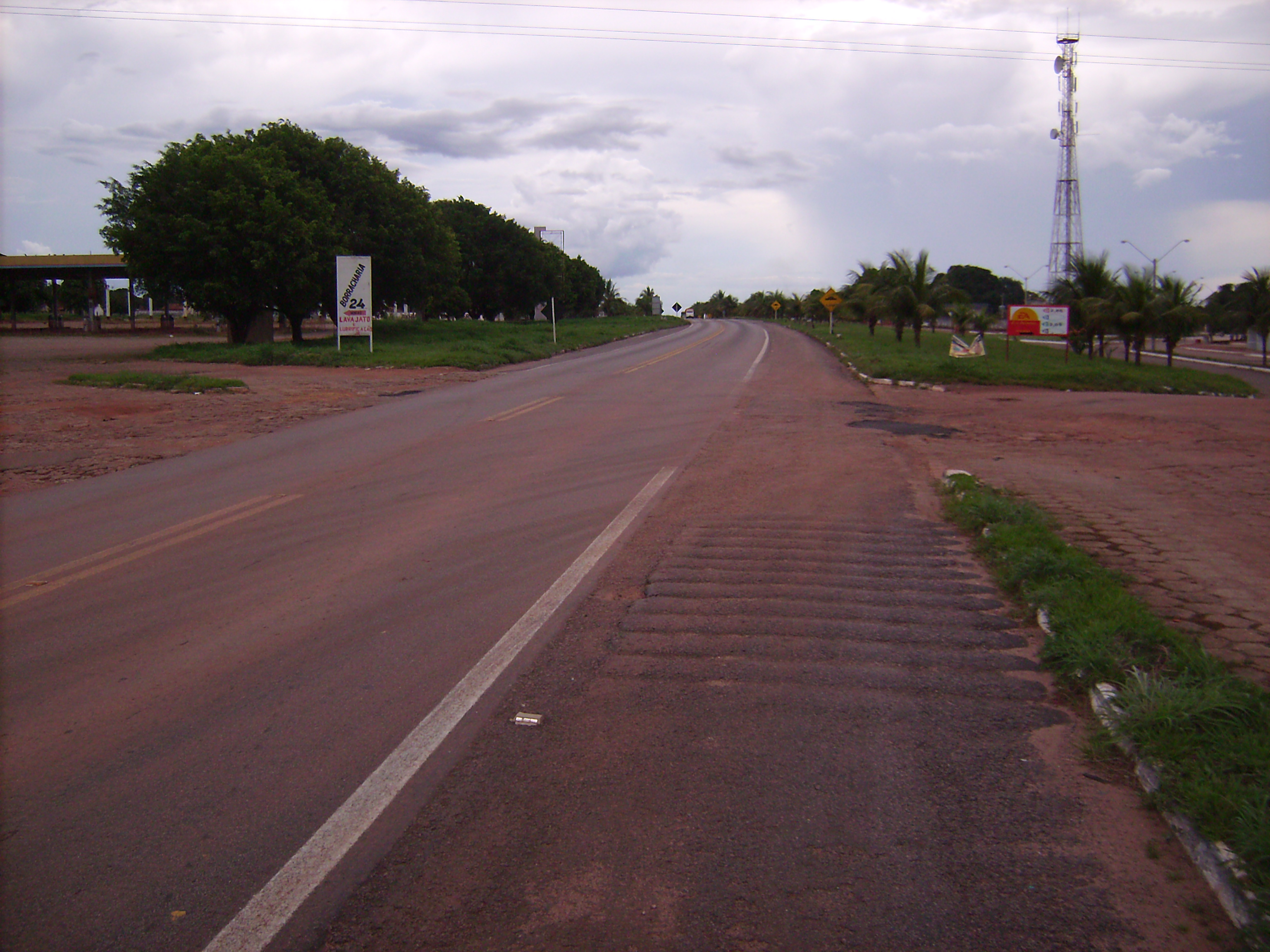 A rodovia federal brasileira BR-153 em Aliança do Tocantins (TO).